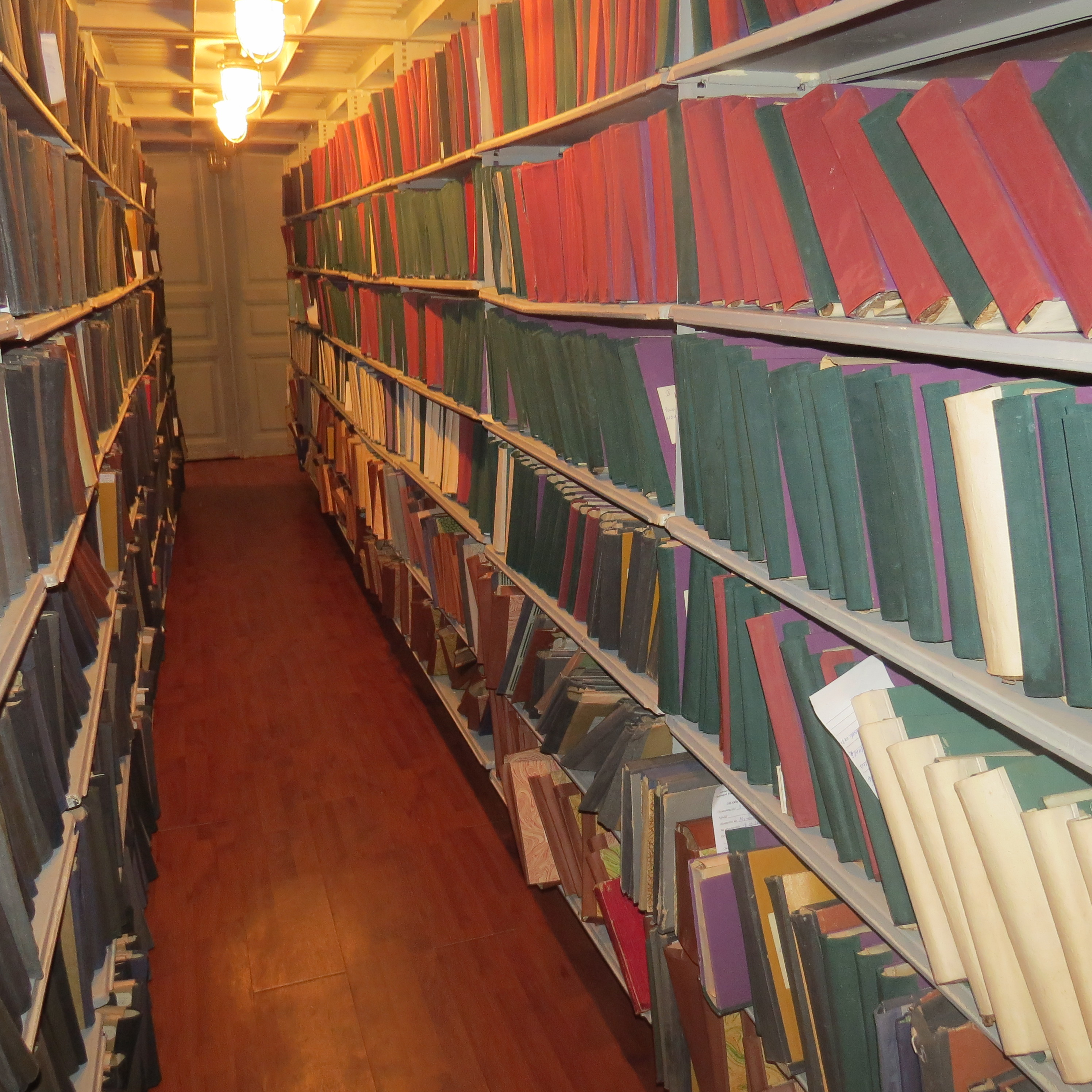 Əlyazmalar saxlancda